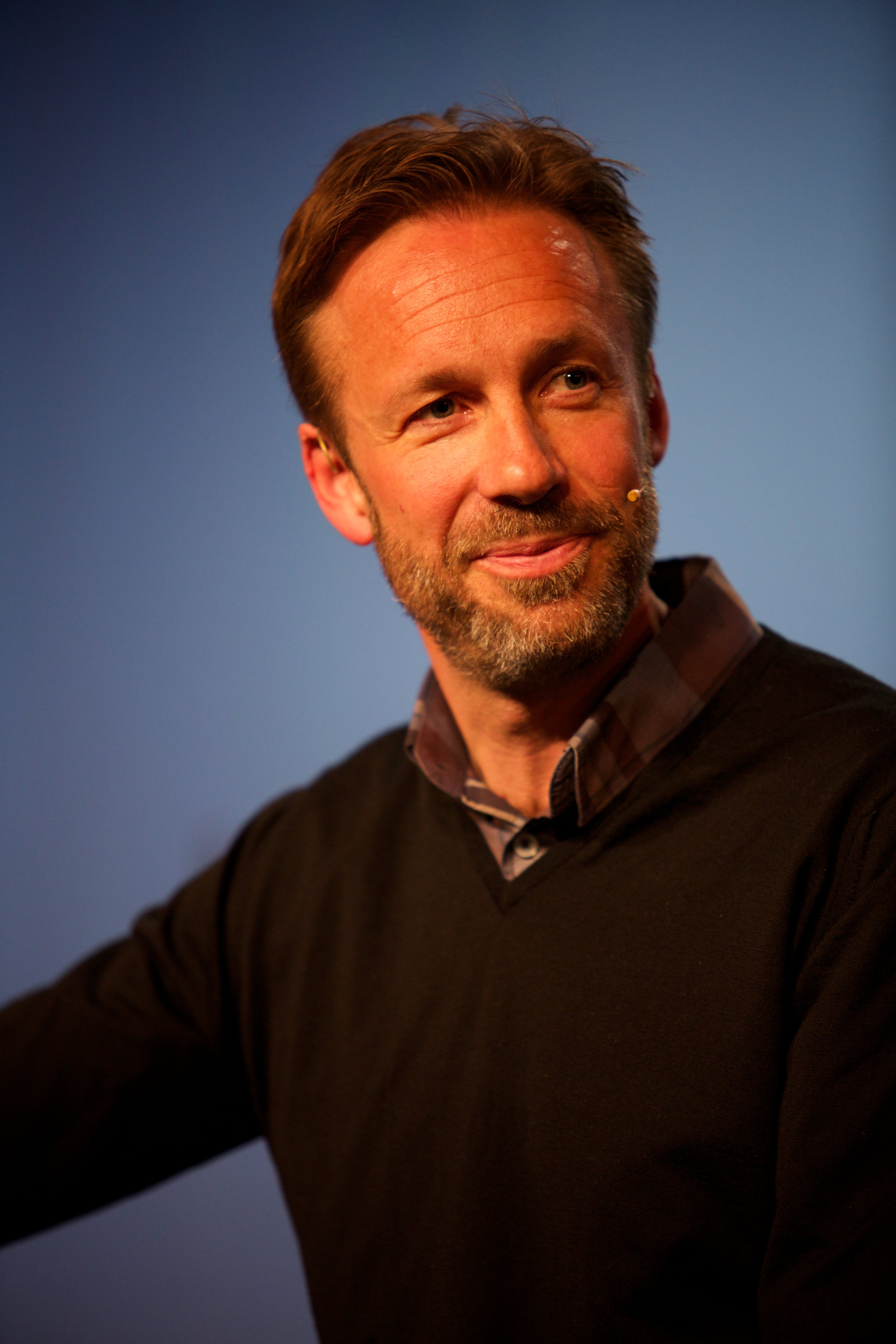 Medvirkende: Thomas Giertsen (Feelgood) Moderator: Svein Tore Bergestuen